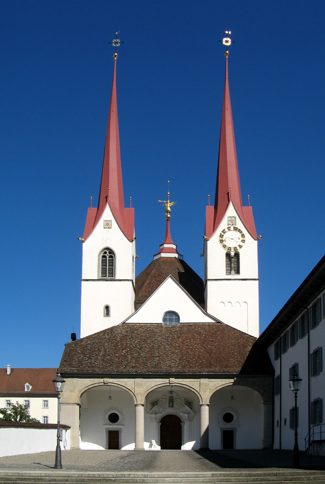 Vorderansicht Klosterkirche Muri